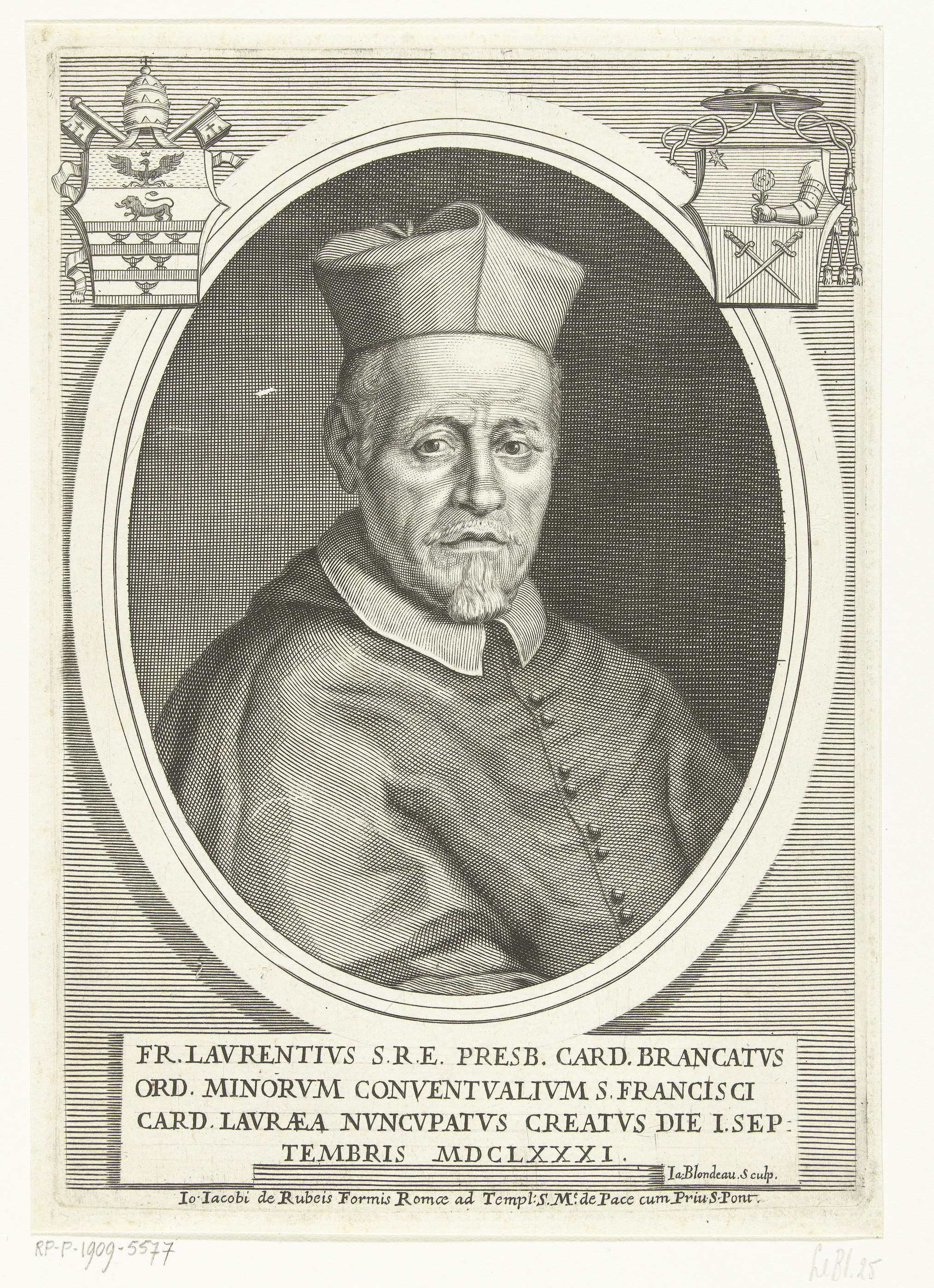 Ritratto del cardinale Lorenzo Brancati (1612-1693) di Lauria